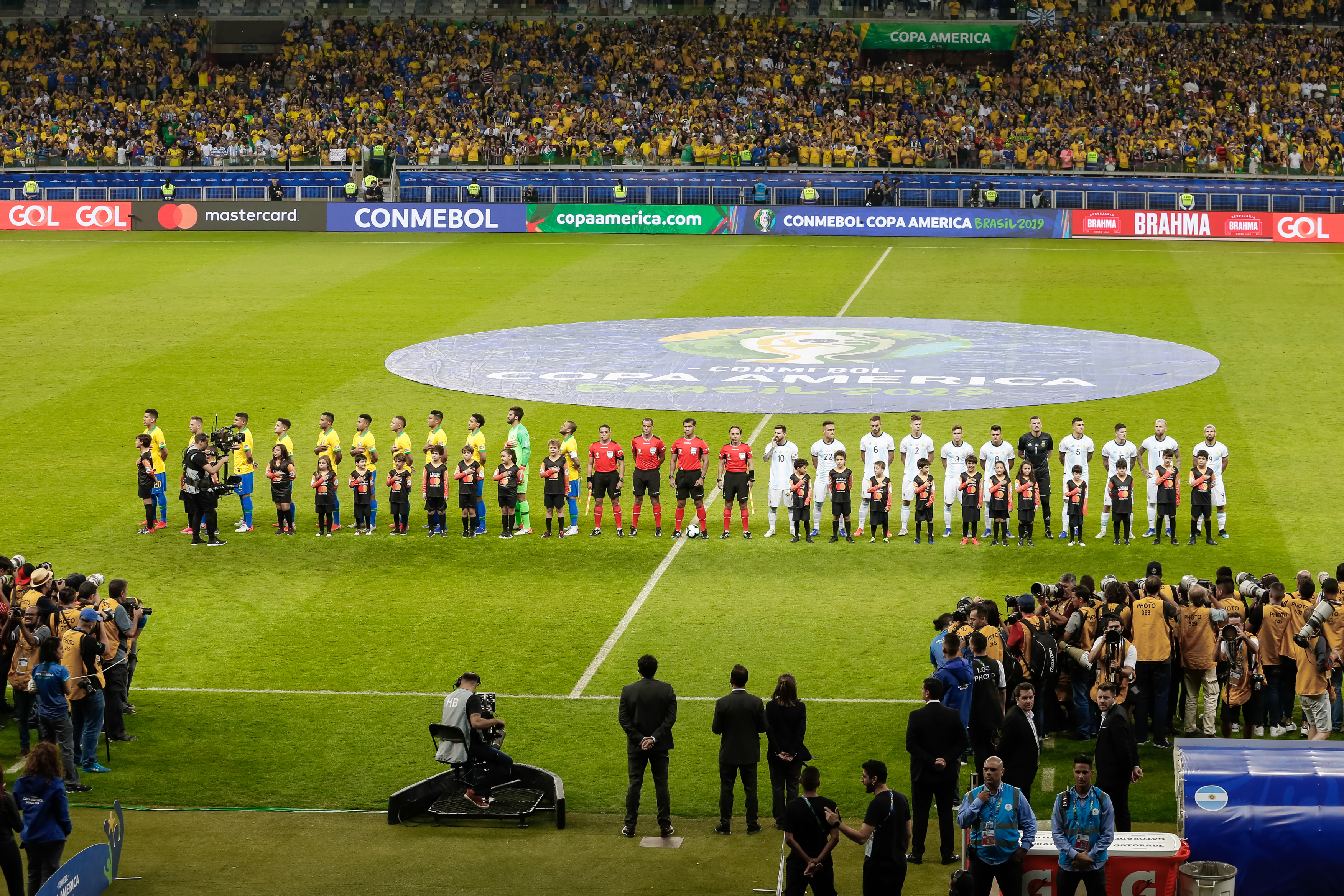 (Belo Horizonte - MG, 02/07/2019) Presidente da República, Jair Bolsonaro durante partida de futebol Brasil e Argentina. Foto: Carolina Antunes/PR